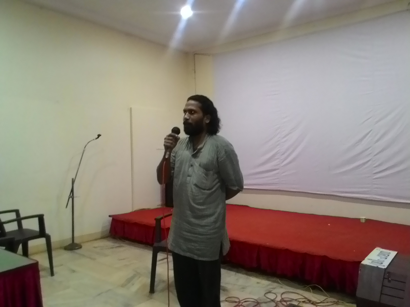 Sudhevan - Malayalam film director